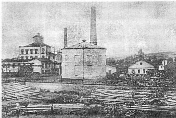 Rájec-Jestřebí, lihovar.